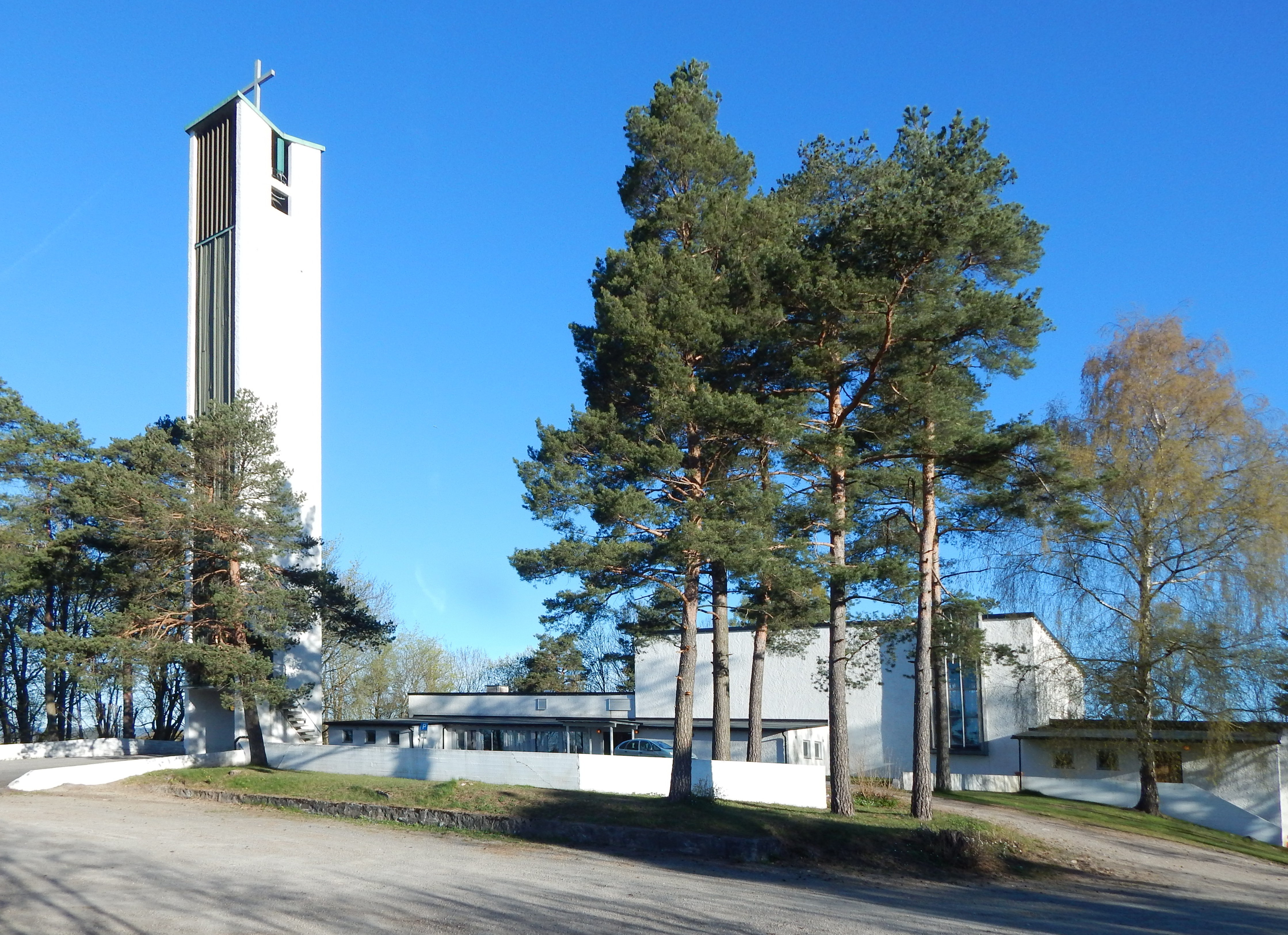 Herøya kirke (Klevstrand sogn, Porsgrunn9